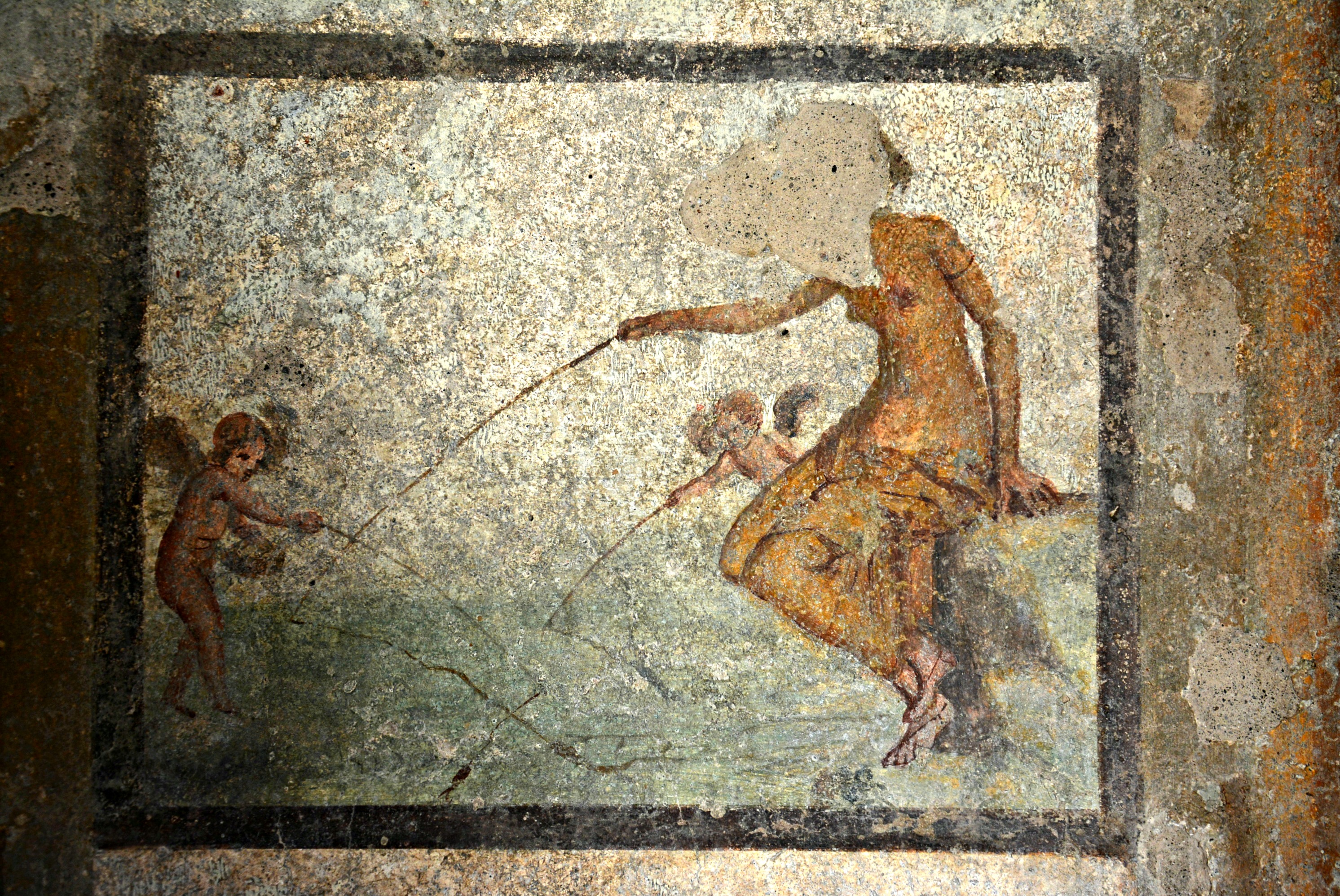 Vedi titolo